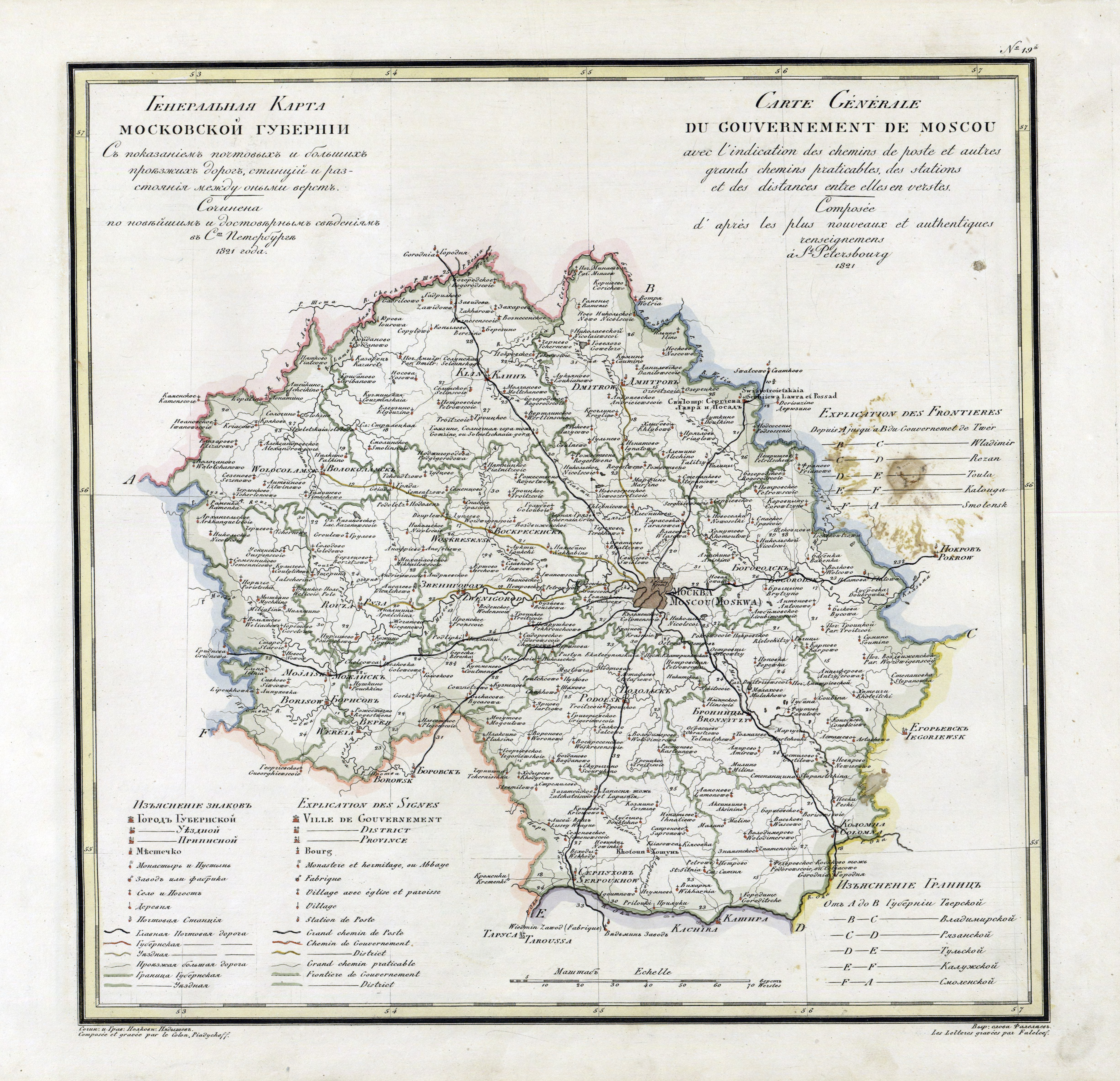 Карта Московской Губернии